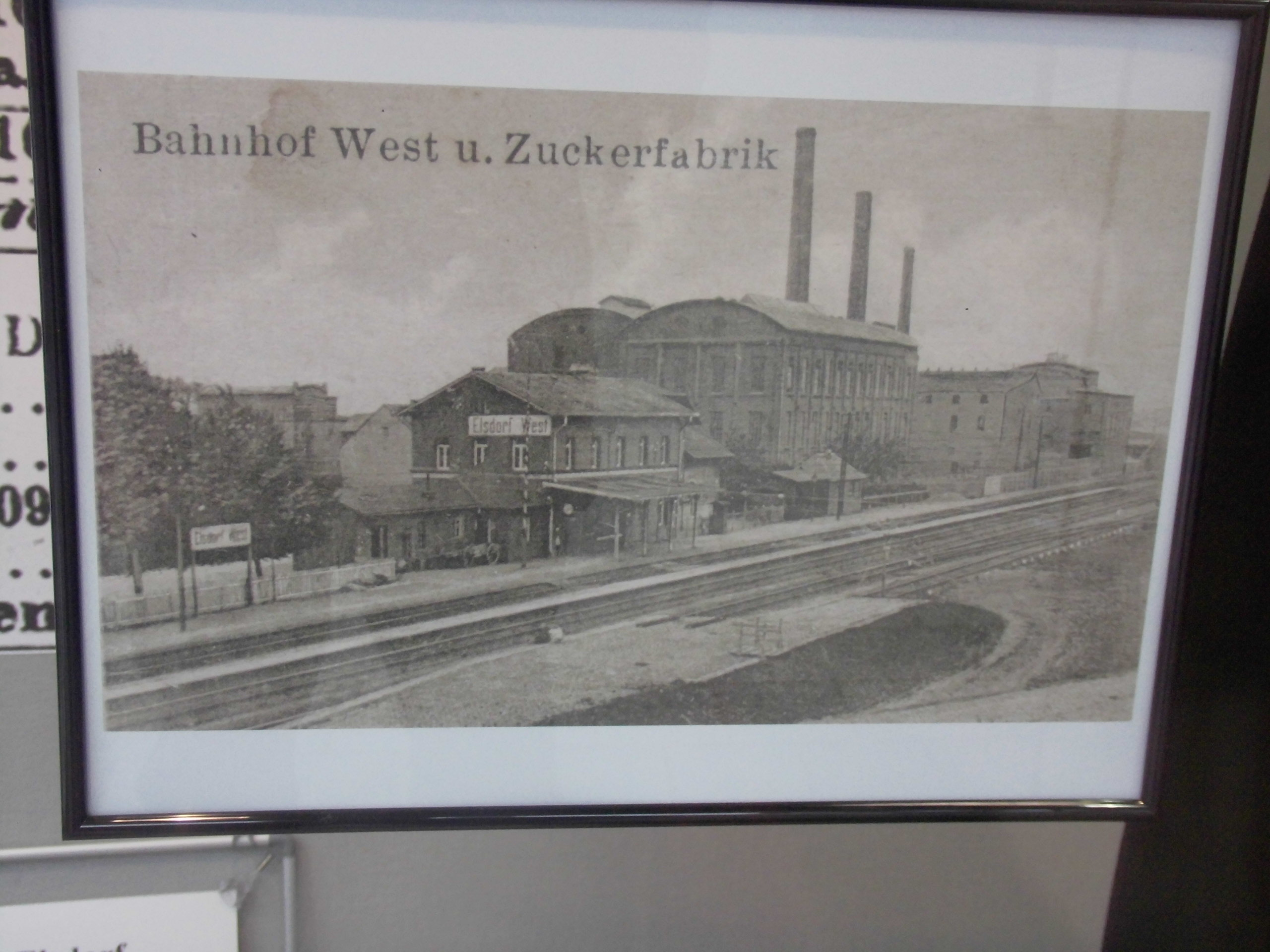 Bahnhof West und Zuckerfabrik in Elsdorf (Schaufensterausstellung des Museumsverein Elsdorf)